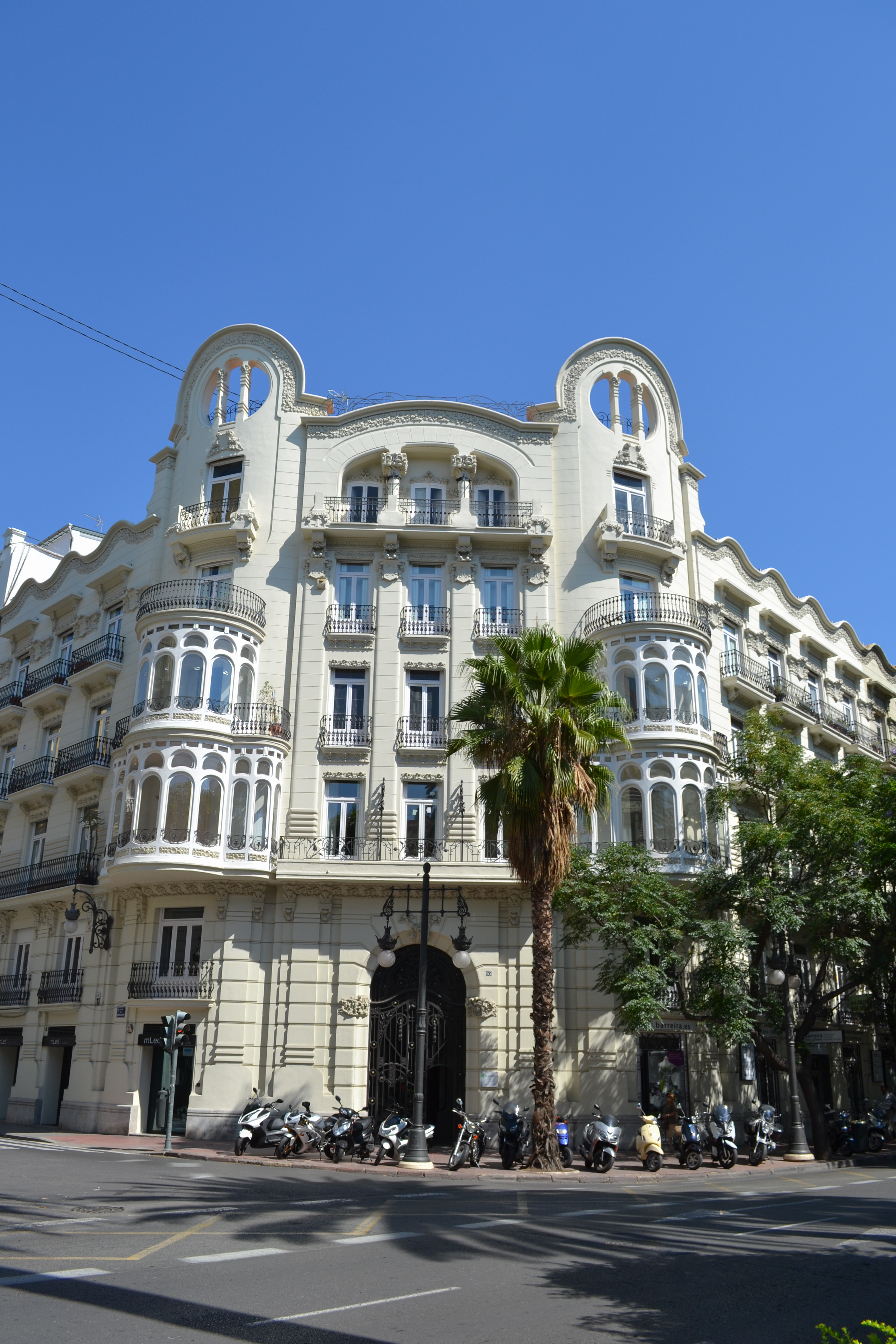 Edifici Xapa, València.